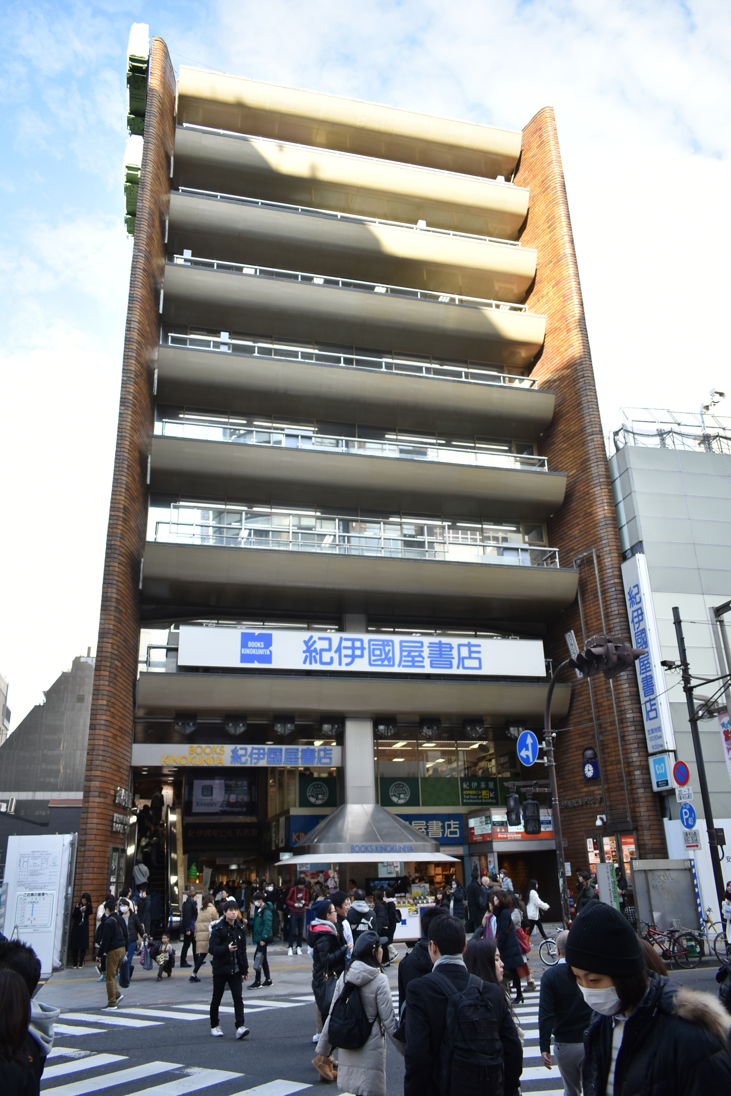 紀伊国屋書店・新宿本店。 Nikon D3400